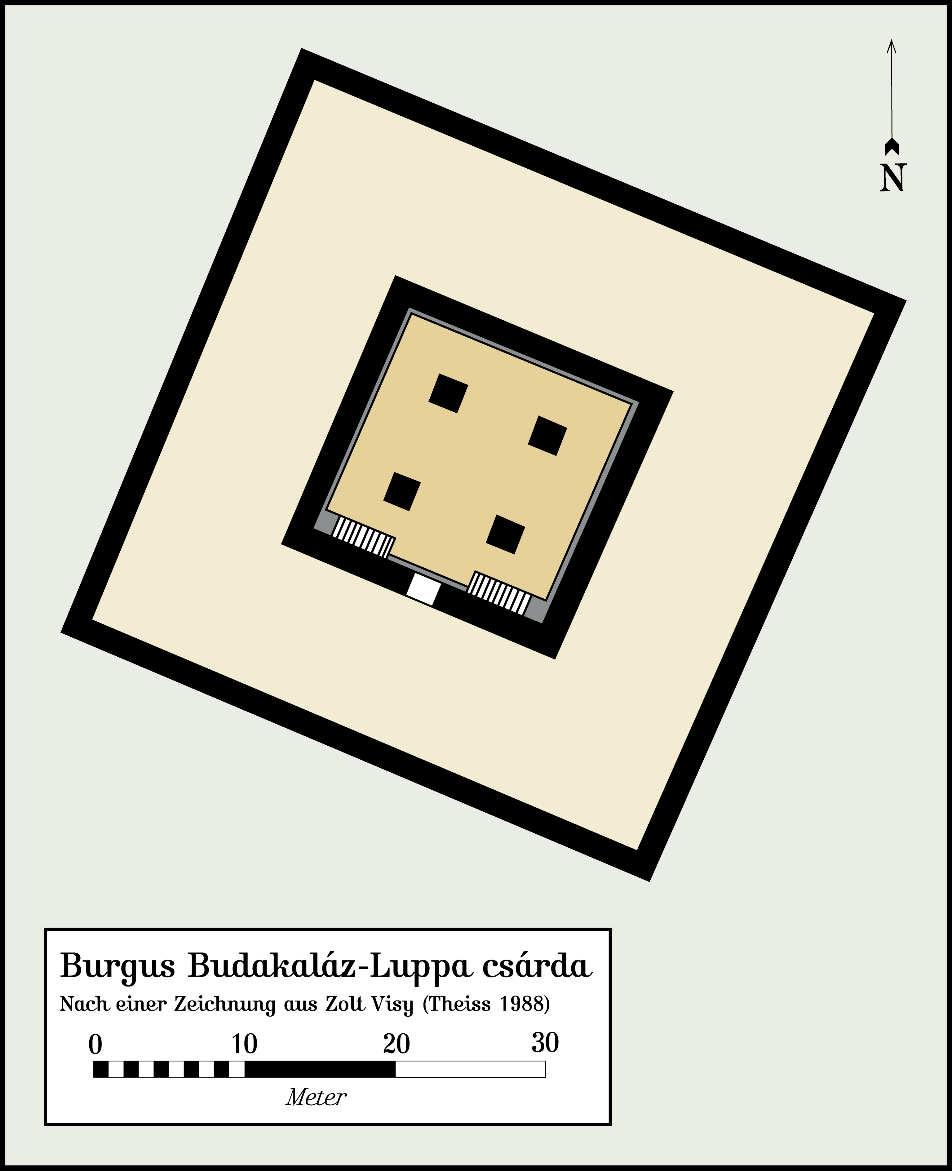 Der Burgus Budakalász-Luppa csárda. Quellen: Zsolt Visy: Der pannonische Limes in Ungarn. Konrad Theiss Verlag, Stuttgart 1988, S. 80. Zeichnung angepaßt an die Maßangaben aus: Jenő Fitz: Der Römische Limes in Ungarn. Fejér Megyei Múzeumok Igazgatósága, 1976, S. 79. Gezeichnet in FreeHand MX für Macintosh; abgespeichert in Adobe Photoshop CS. Dies ist die Originalversion der Zeichnung.